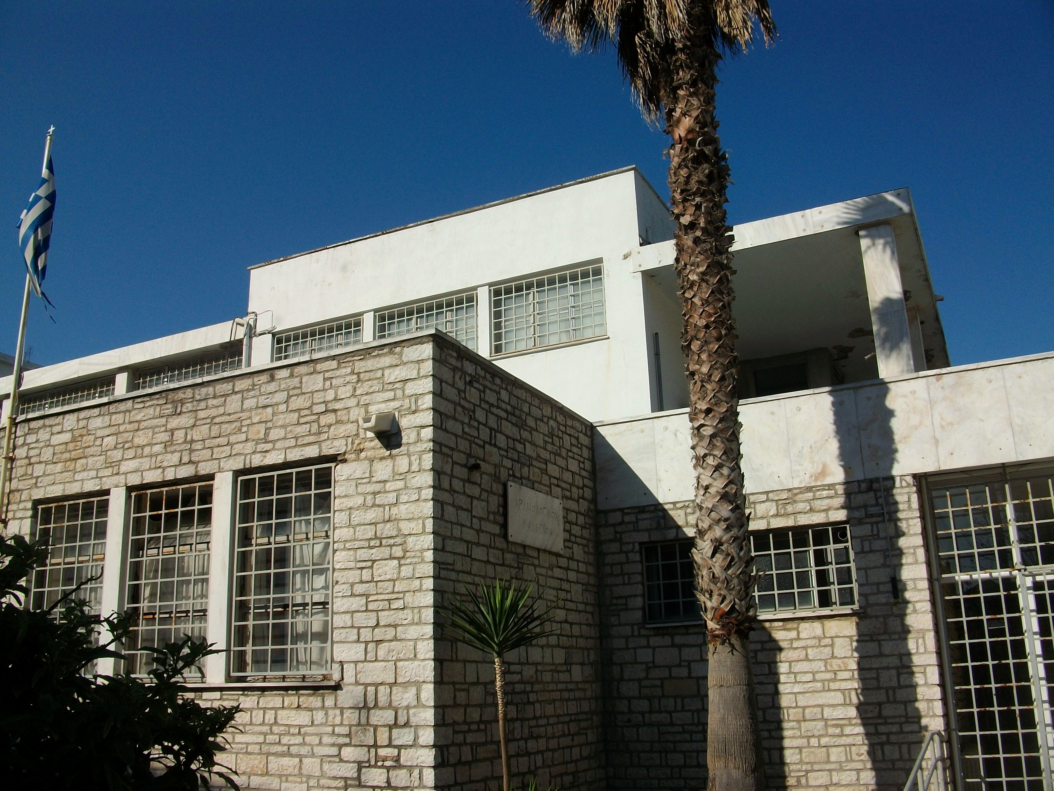 Museu Arqueològic de Corfú, exterior.